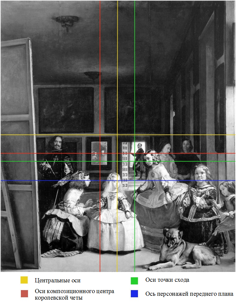 Перевод на русский изображение пользователя Prof.SpongeBob из немецкой Википедии